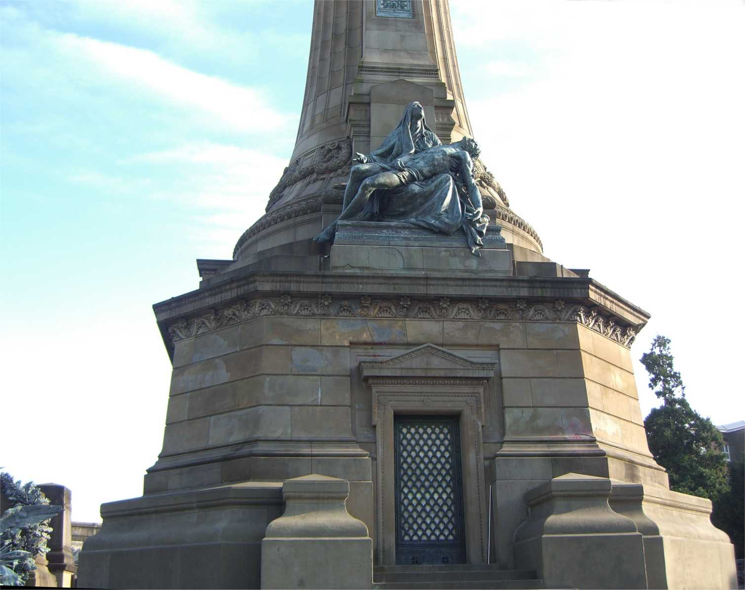 Cappella espiatoria base con il gruppo bronzeo della Pietà opera di Ludovico Pogliaghi